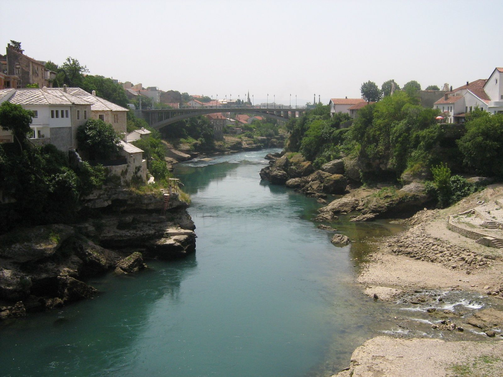 River Neretva